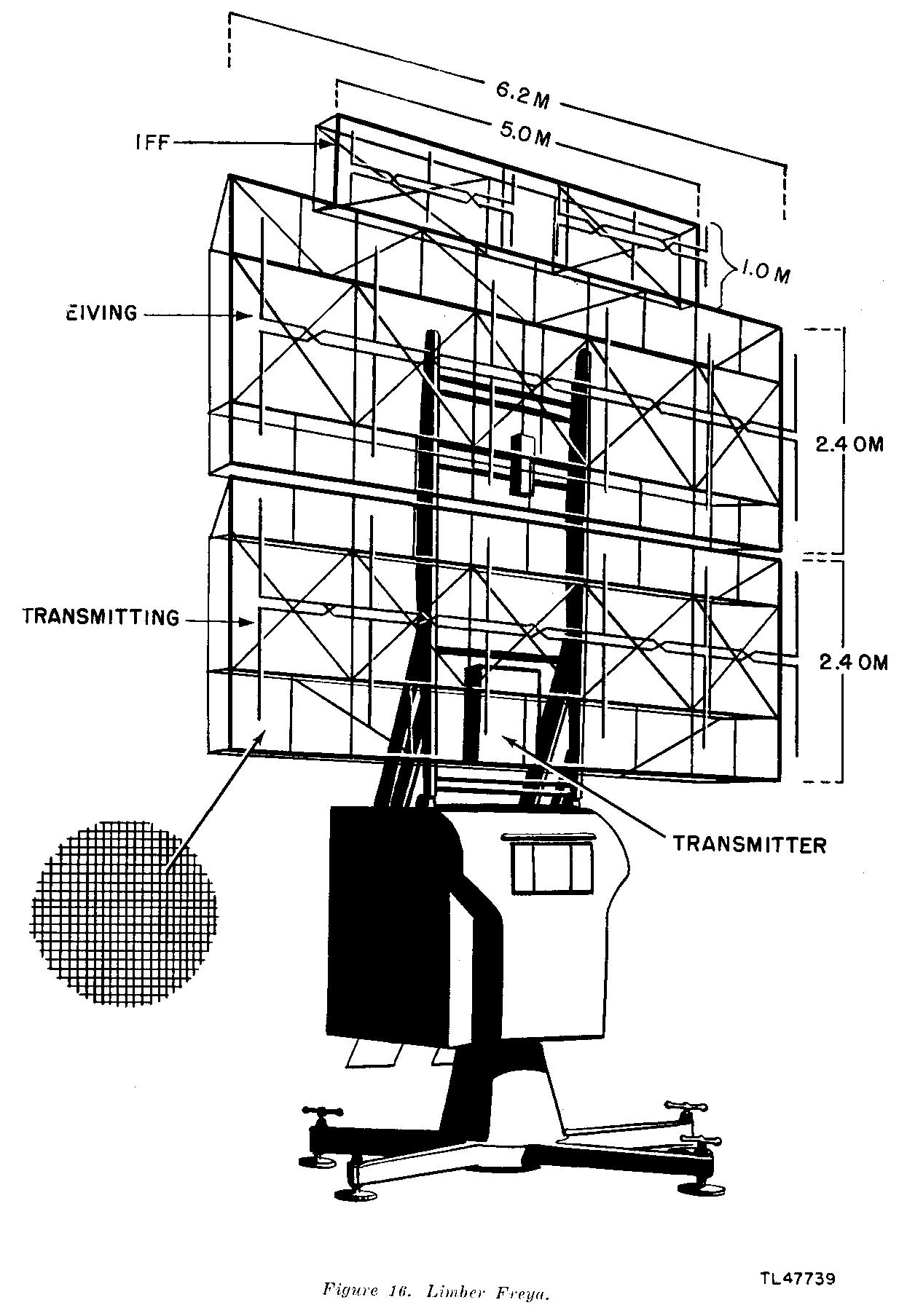 FuMG 450 Freya Antennenanordnung